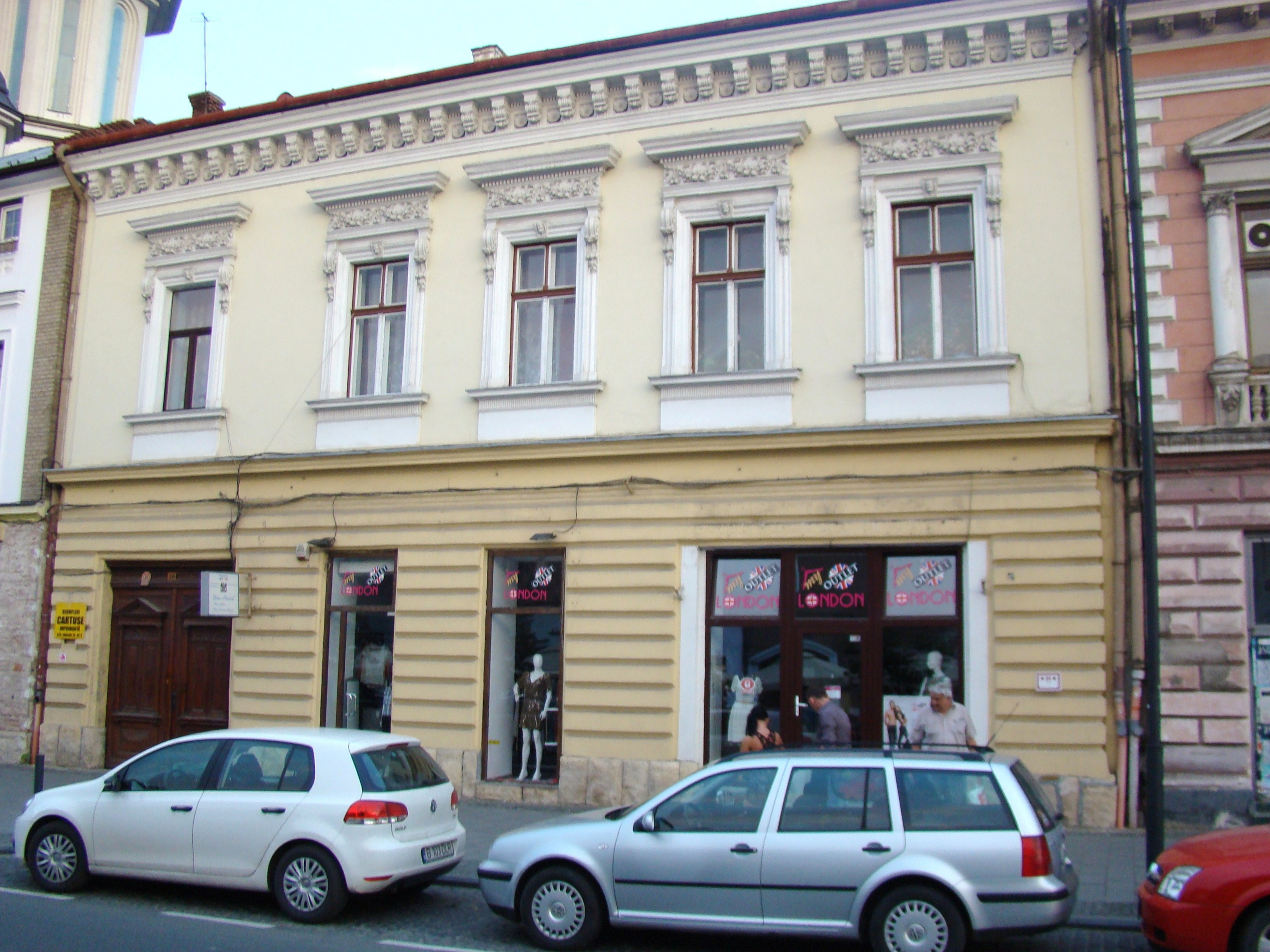 Clădire monument istoric, Bd.Eroilor, nr.20 (Casa Katona)